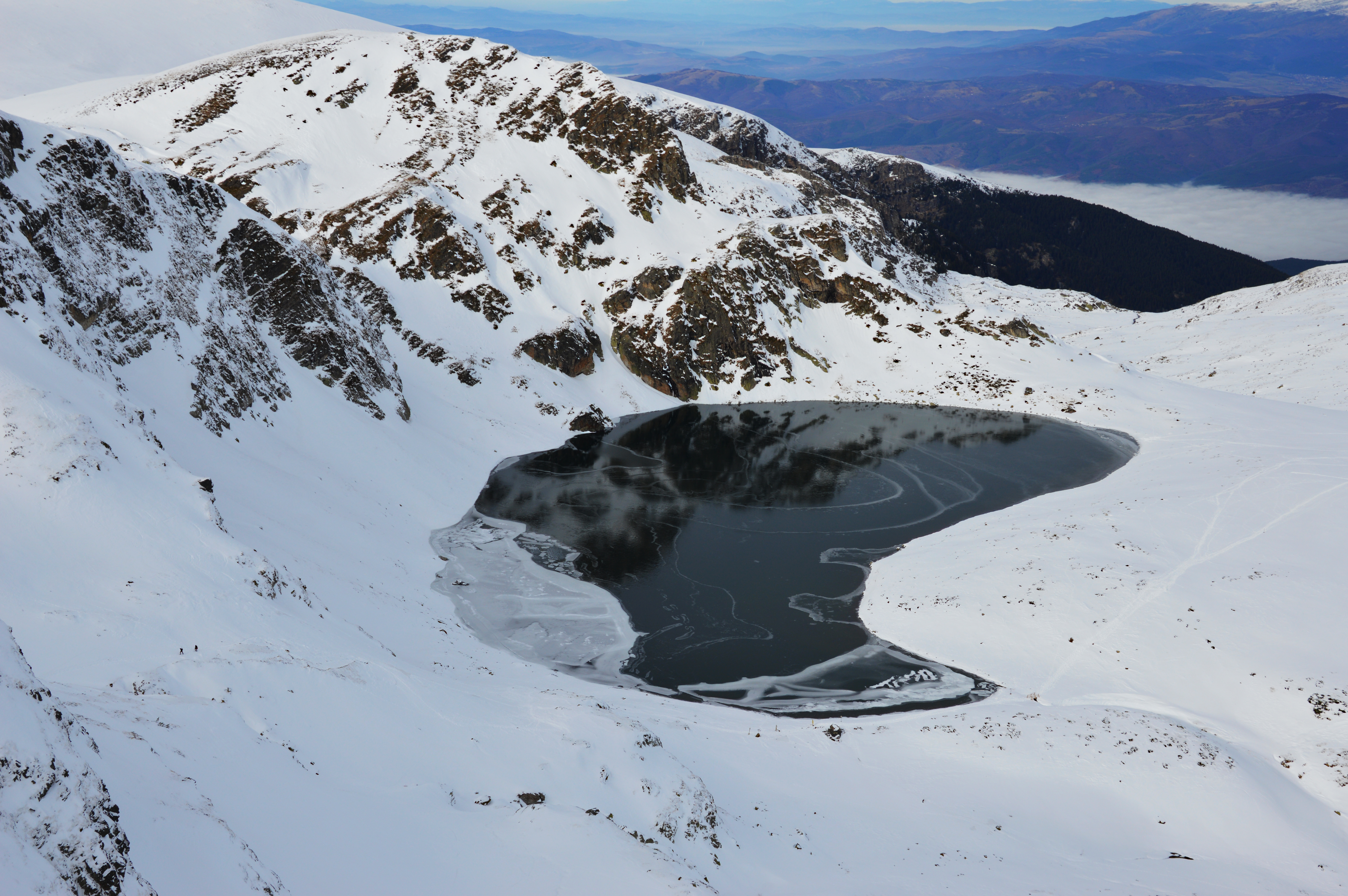 Рила, Езерото „Бъбрека“